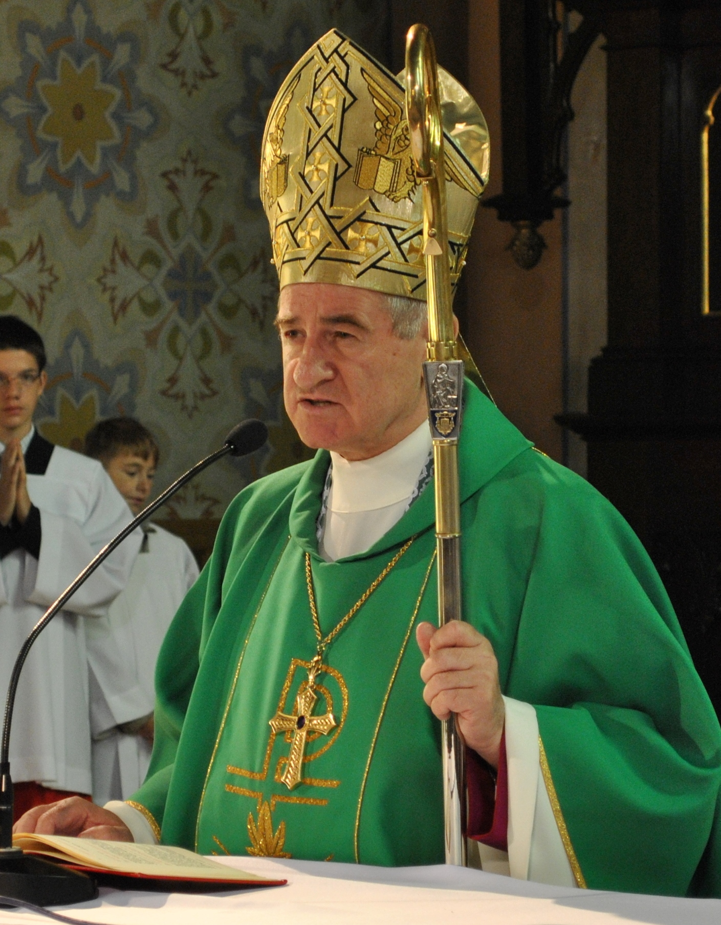 bp Stanisław Gębicki - podczas mszy św. w kościele Podwyższenia Krzyża Świętego w Kole